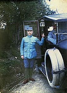 General Pétain